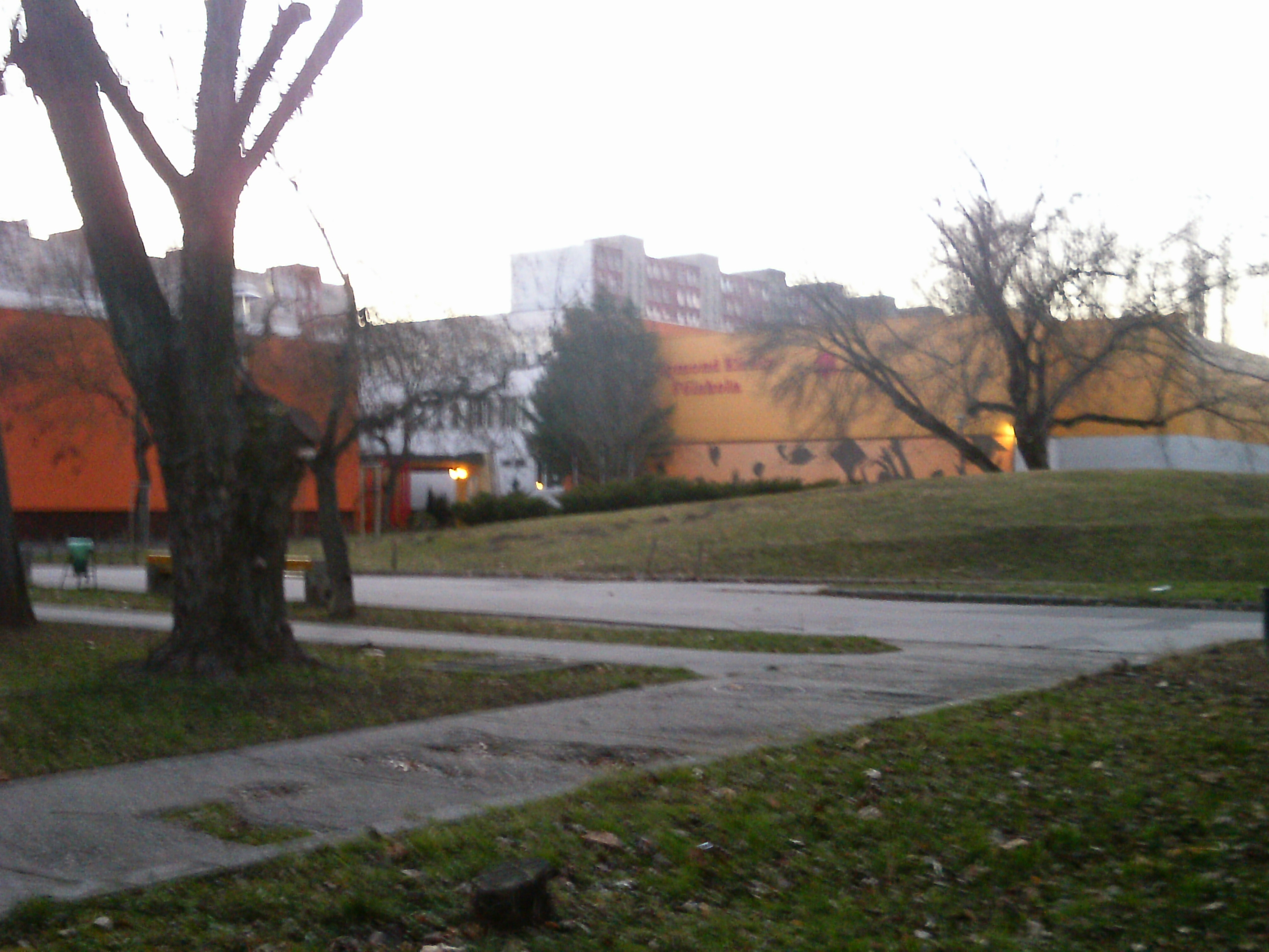 Zsigmond Király Egyetem